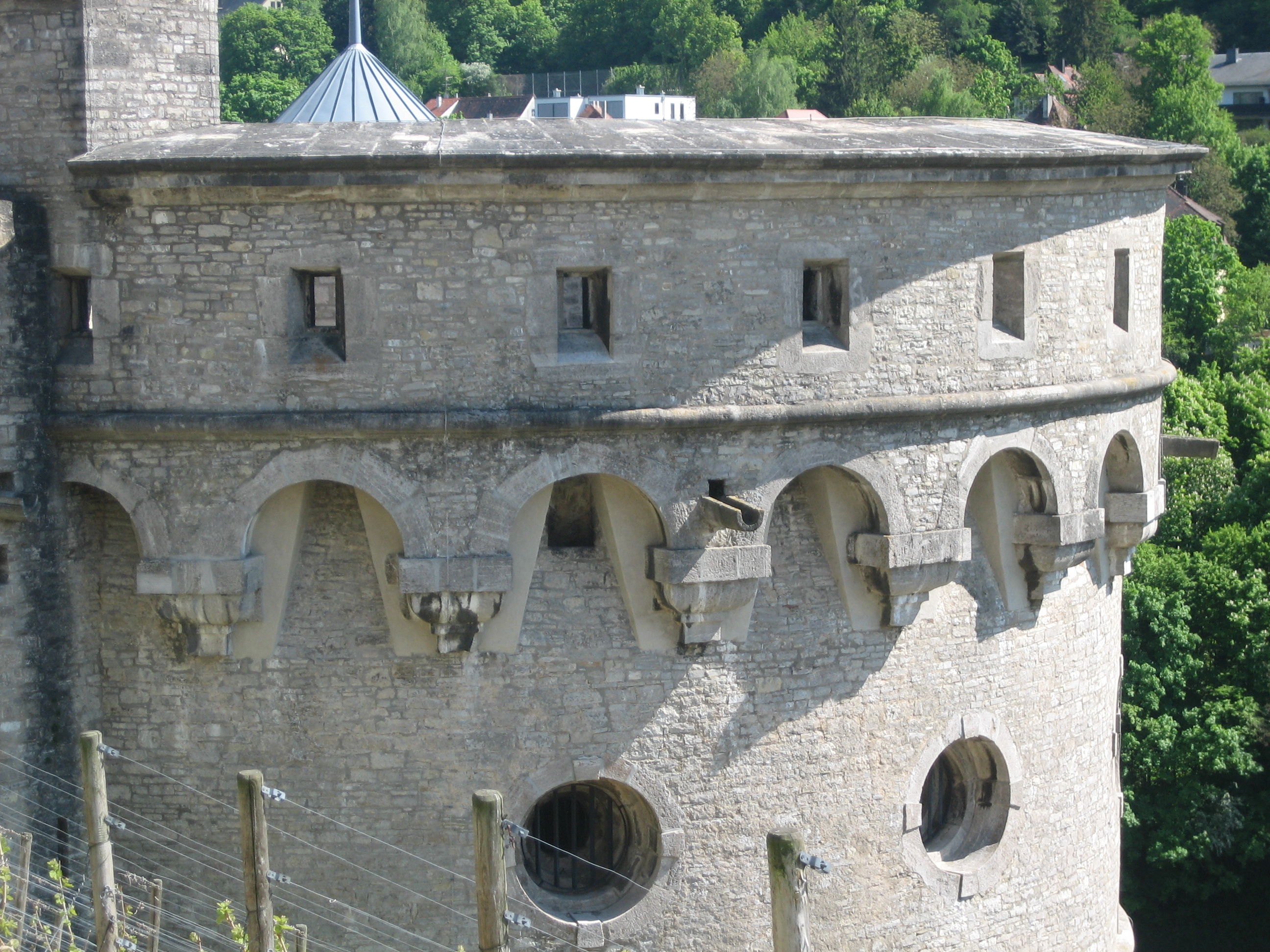 Maschikuli tower of Wurzburg fortress, Germany / Maschikuliturm, Festung Würzburg